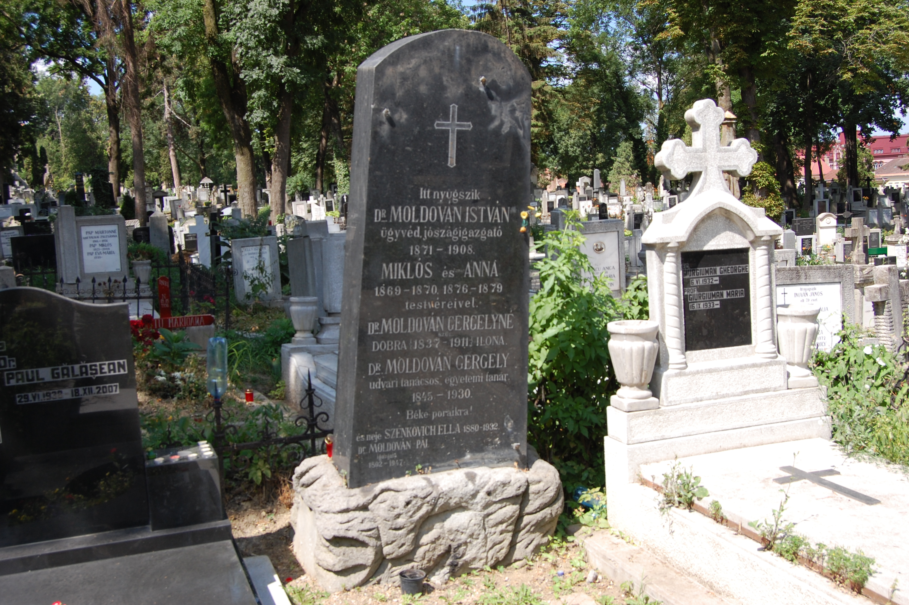 Moldován Gergely (1845-1930) egyetemi tanár síremléke a Házsongárdi temetőben (II. b. parcella) 299